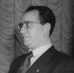 Berlin, Nagel, Liebknecht, Mickin Zentralbild Funck 5 Motive 19.11.1954 Tagung der Architekten und bildenden Künstler in Berlin Architekten und Bildende Künstler fanden sich am 19. und 20.11.1954 im Marmorsaal im Zentralhaus der Gesellschaft für Deutsch-Sowjetische Freundschaft in Berlin zu einer Tagung zusammen, um über ihre Aufgaben zu sprechen. UBz: Im Gespräch während einer Pause (v.r.n.l.) Walter Mickin vom Bund Deutscher Architekten, der Präsident der Deutschen Bauakademie, Professor Liebknecht und Professor Nagel, Vizepräsident der Deutschen Akademie der Künste. Abgebildete Personen: Nagel, Otto Prof.: Maler, Präsident der Akademie der Künste (AdK), Nationalpreisträger, Vaterländischer Verdienstorden (VVO) in Gold, DDR (GND 118586300)